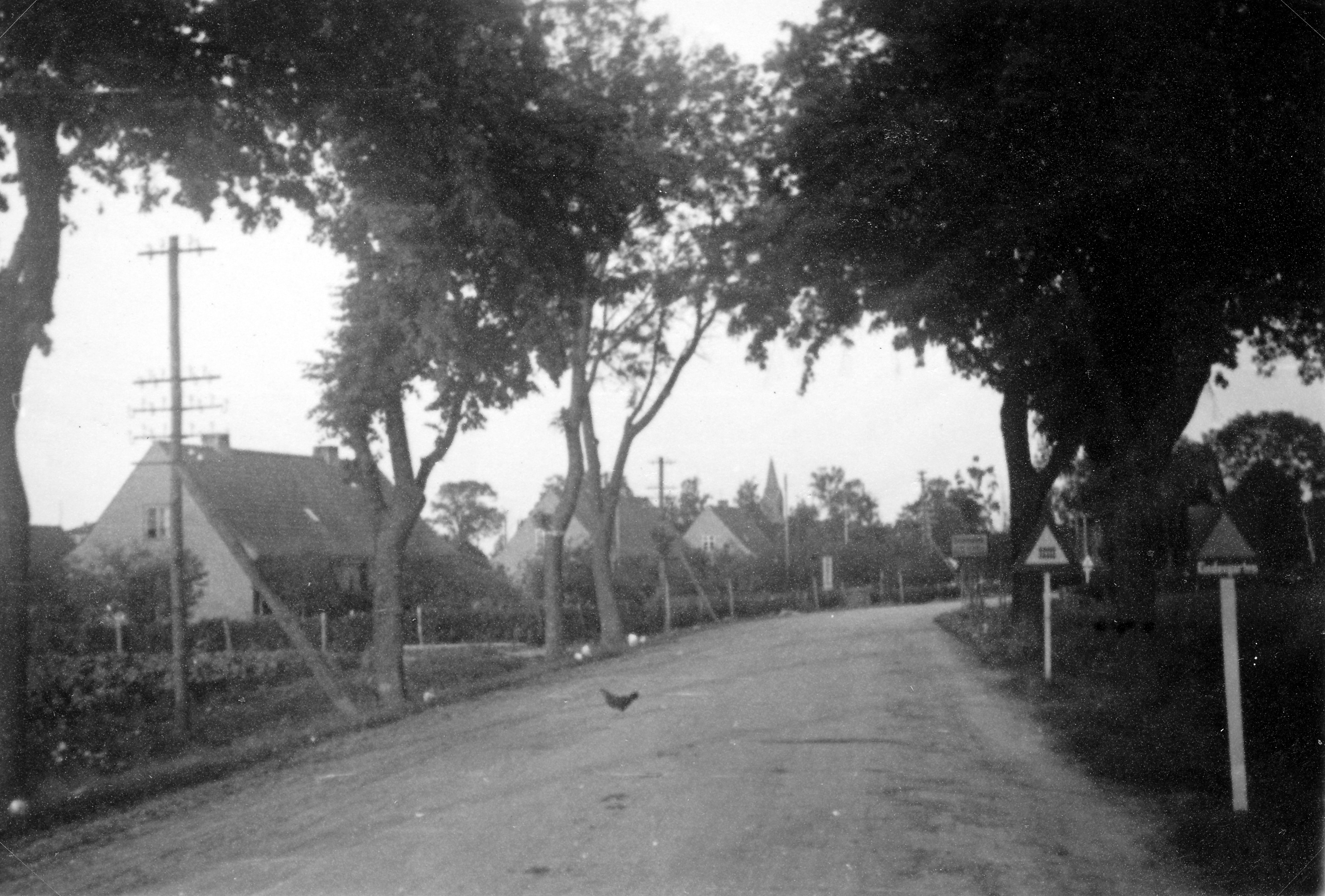 Grünheide (Kreis Insterburg) 1939, Dorfstraße, westlich der Bahnlinie Koordinaten des Standortes: 54°48'10.10N 21°53'51.27O Kaluschskoje (russisch Калужское, deutsch Grünheide, Kreis Insterburg, litauisch Gryneidė) ist ein Ort in der russischen Oblast Kaliningrad im Rajon Tschernjachowsk.